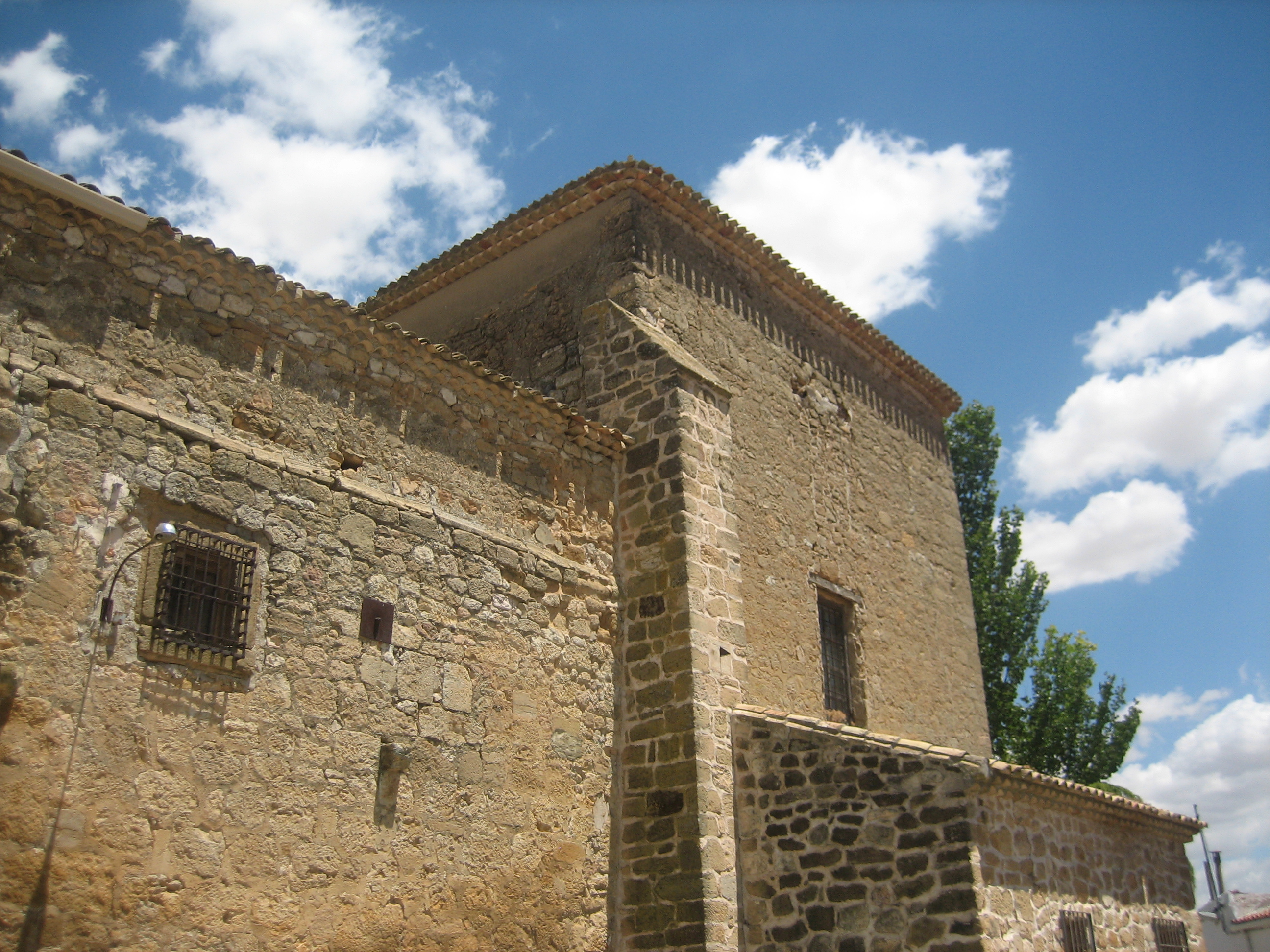 Cabecera de la Iglesia de San Pedro Apóstol de Cervera del Llano